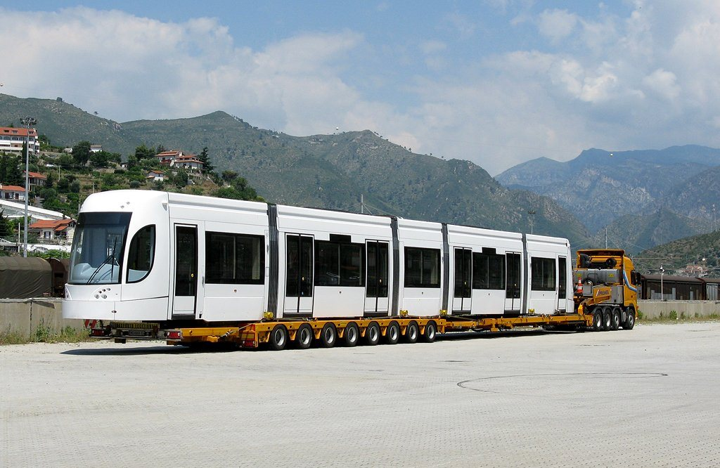 Bombardier Flexity Outlook di proprietà AMAT presso lo scalo Parco Roja-Ventimiglia pronto per il trasporto verso Palermo.